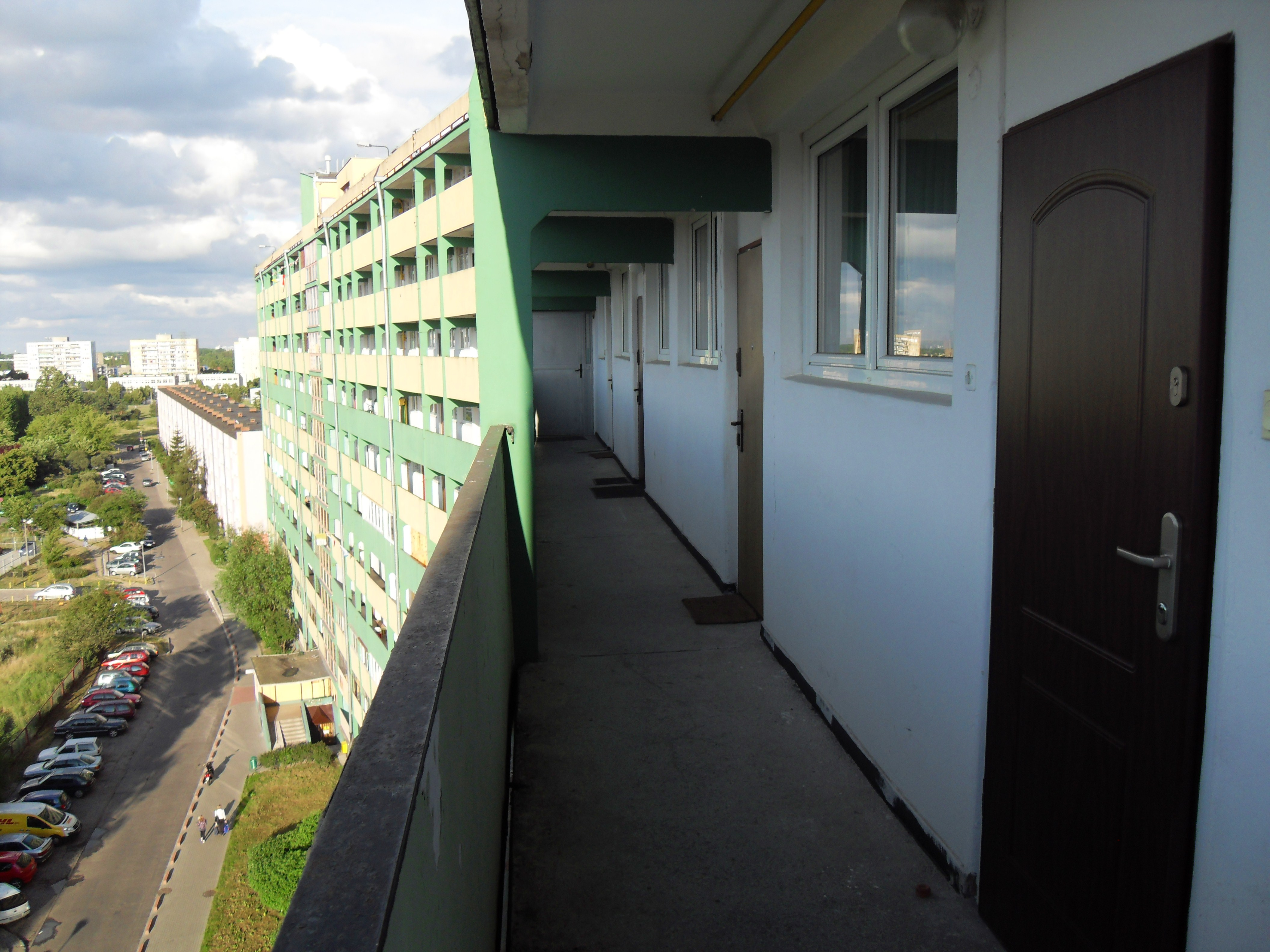 Gdańsk Przymorze. Galeria (korytarz do mieszkań) falowca.